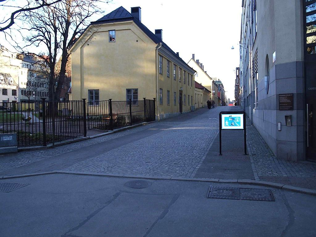 Postgatan i Göteborg, den 19 december 2004. En bild tagen av Harri Blomberg.